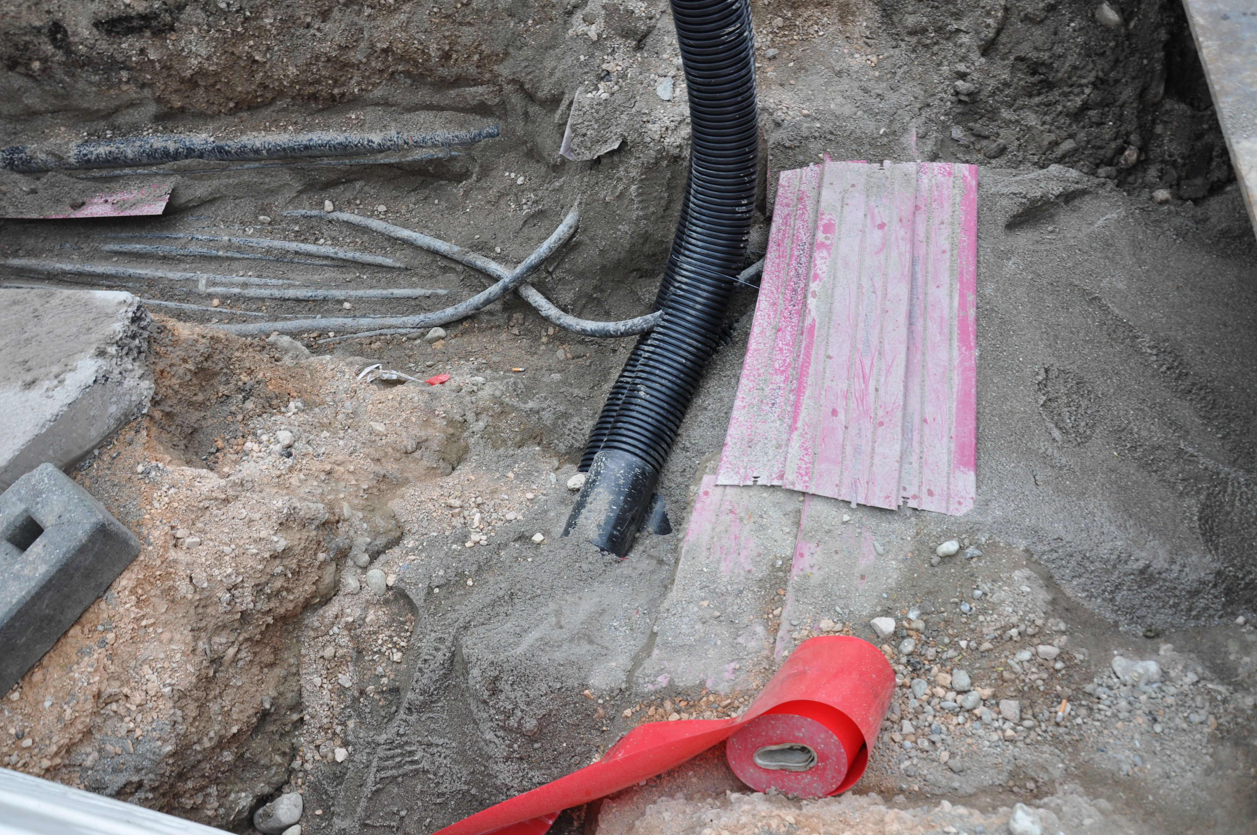 Zahlreiche Erdkabel (ältere Stromkabel oben links) ohne Schutz; daneben ein Kabelschutzrohr, Trassenband und Kunststoffplatten